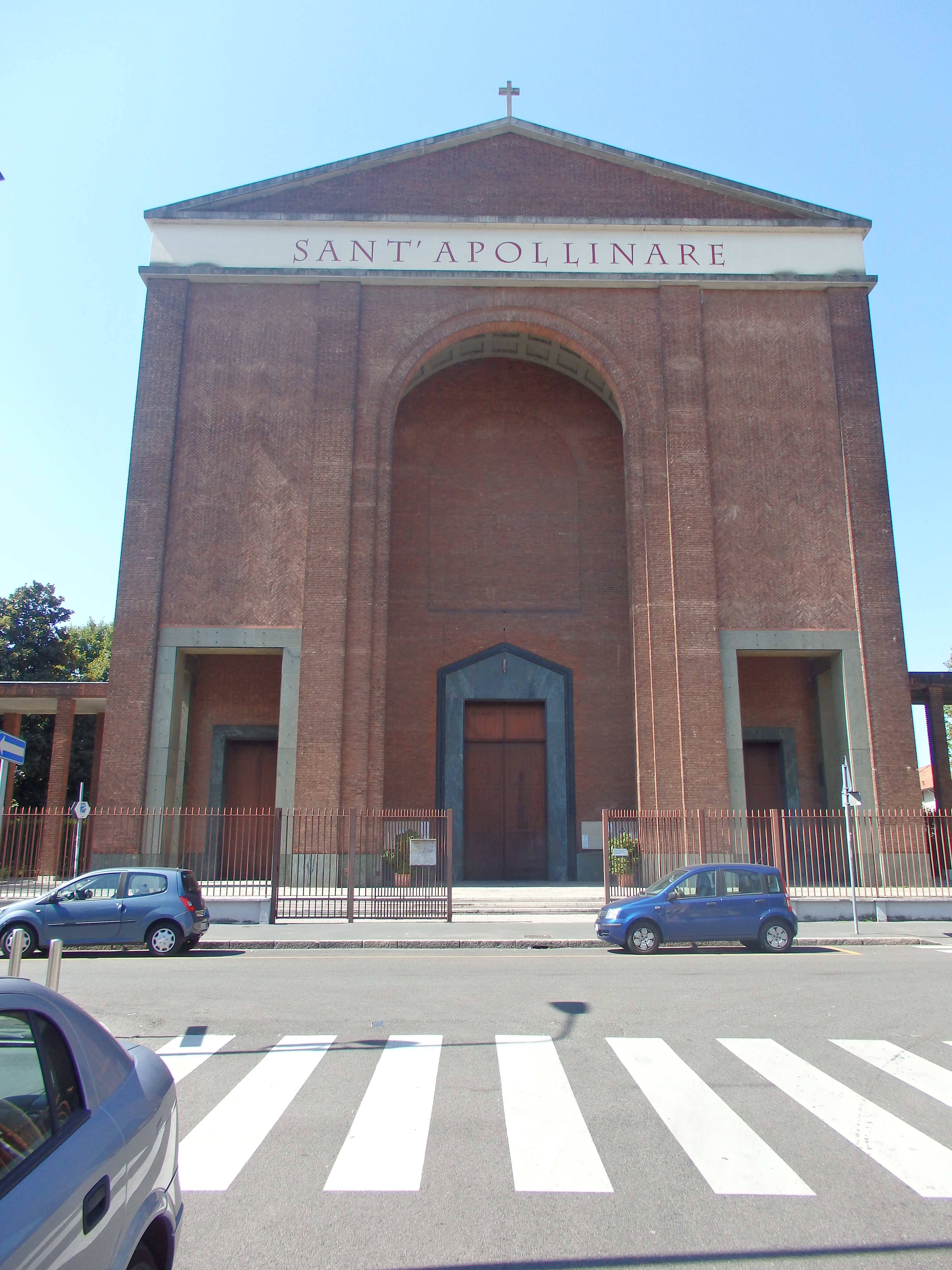 Chiesa di Baggio